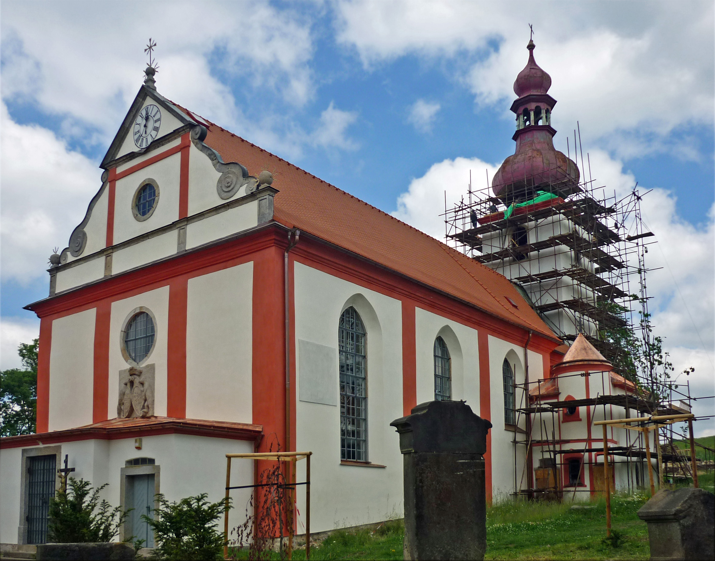 Kirche des Hl. Simon und Judas in Hainspach (Lipová) in Nordböhmen